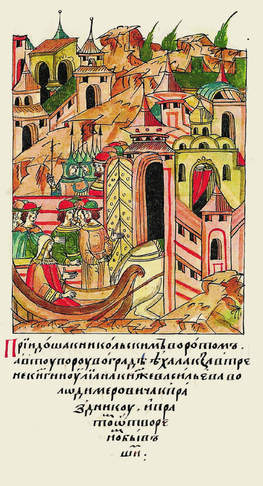 пришли к Николь- ским воротам. А в ту пору в город ехала на праздник к заутрене Ульяна, княгиня князя Василия Владимиро- вича, и ворота были отворены.